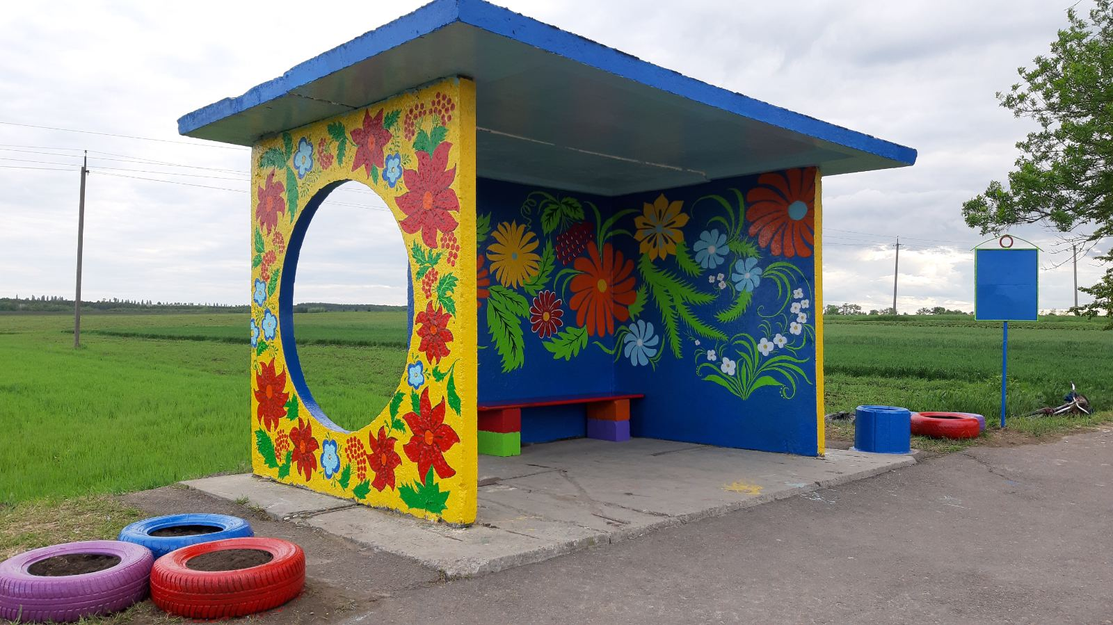 Художньо оформлена жителями села автобусна зупинка на території с. Завадівка